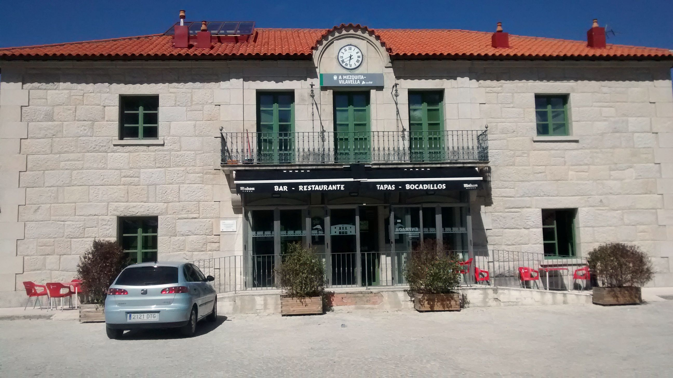 Fachada principal